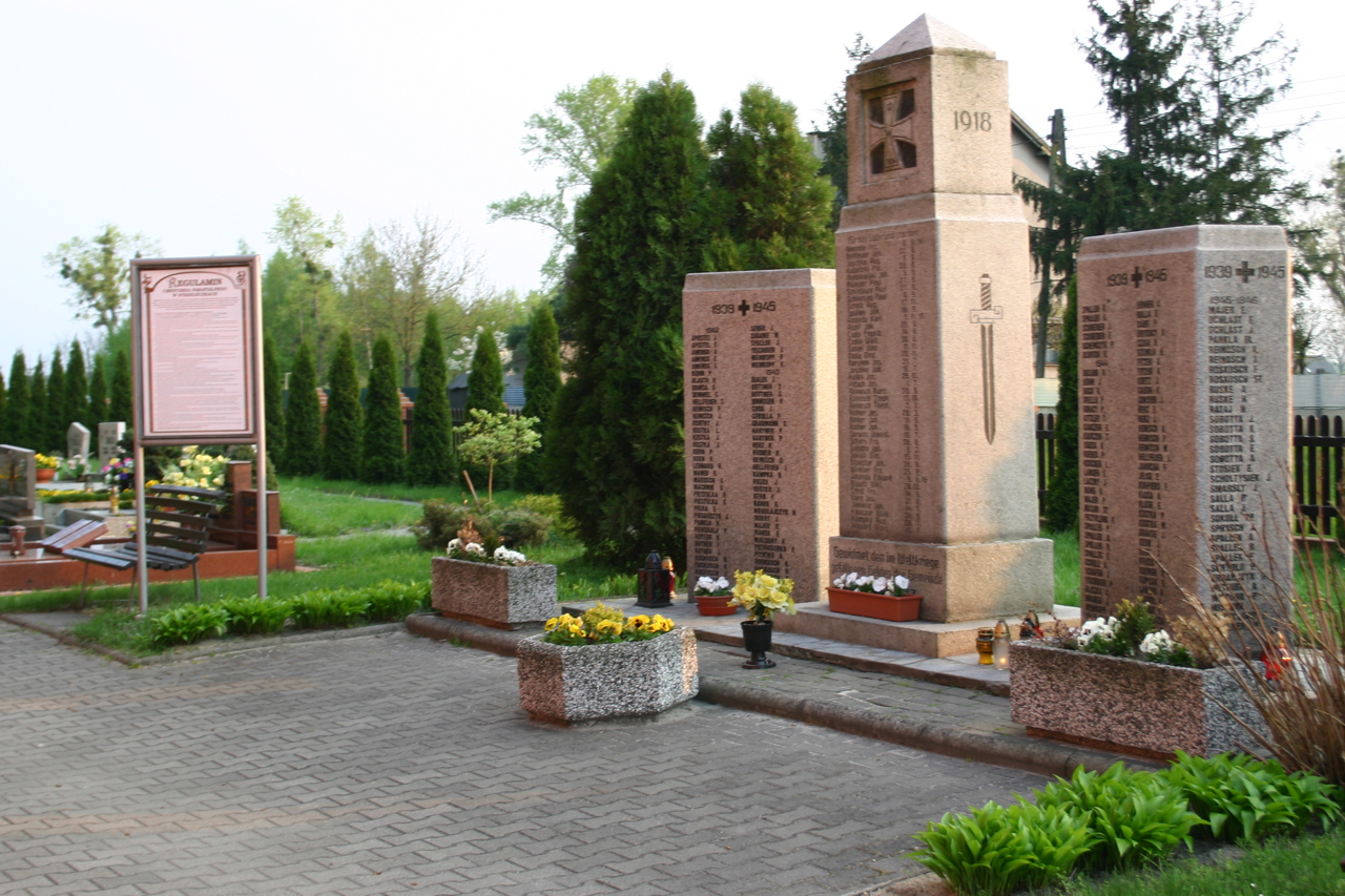 Strzeleczki.Klein Strehlitz. Object location50° 27′ 30″ N, 17° 51′ 24″ E